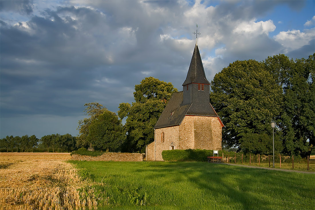 Nikolauskapelle in Langerwehe-Geich, Kreis Düren This is a photograph of an architectural monument.